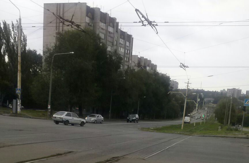 Запоріжжя